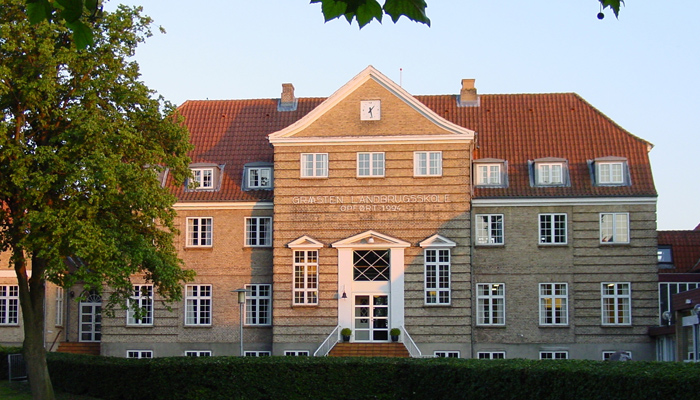 Gråsten landbrugsskole i dag